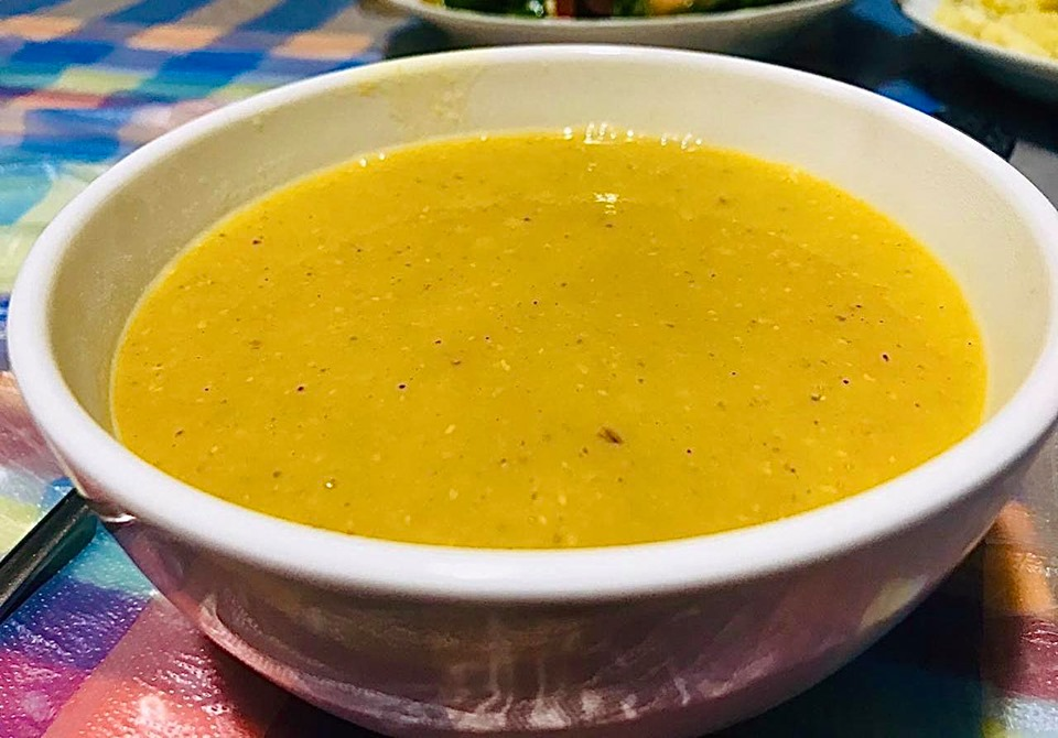 طبق يحتوي على شوربة العدس المجروش